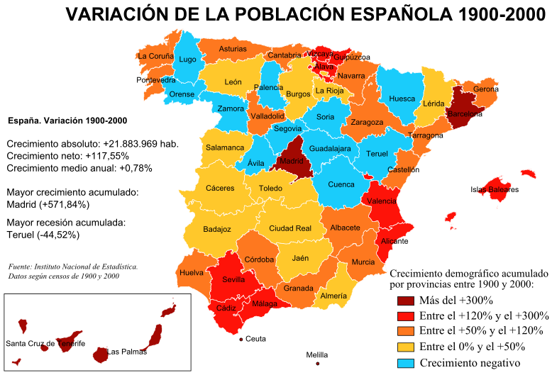 Mapa de España con las variaciones de población por provincias en el periodo 1900-2000, según los censos correspondientes del Instituto Nacional de Estadística.